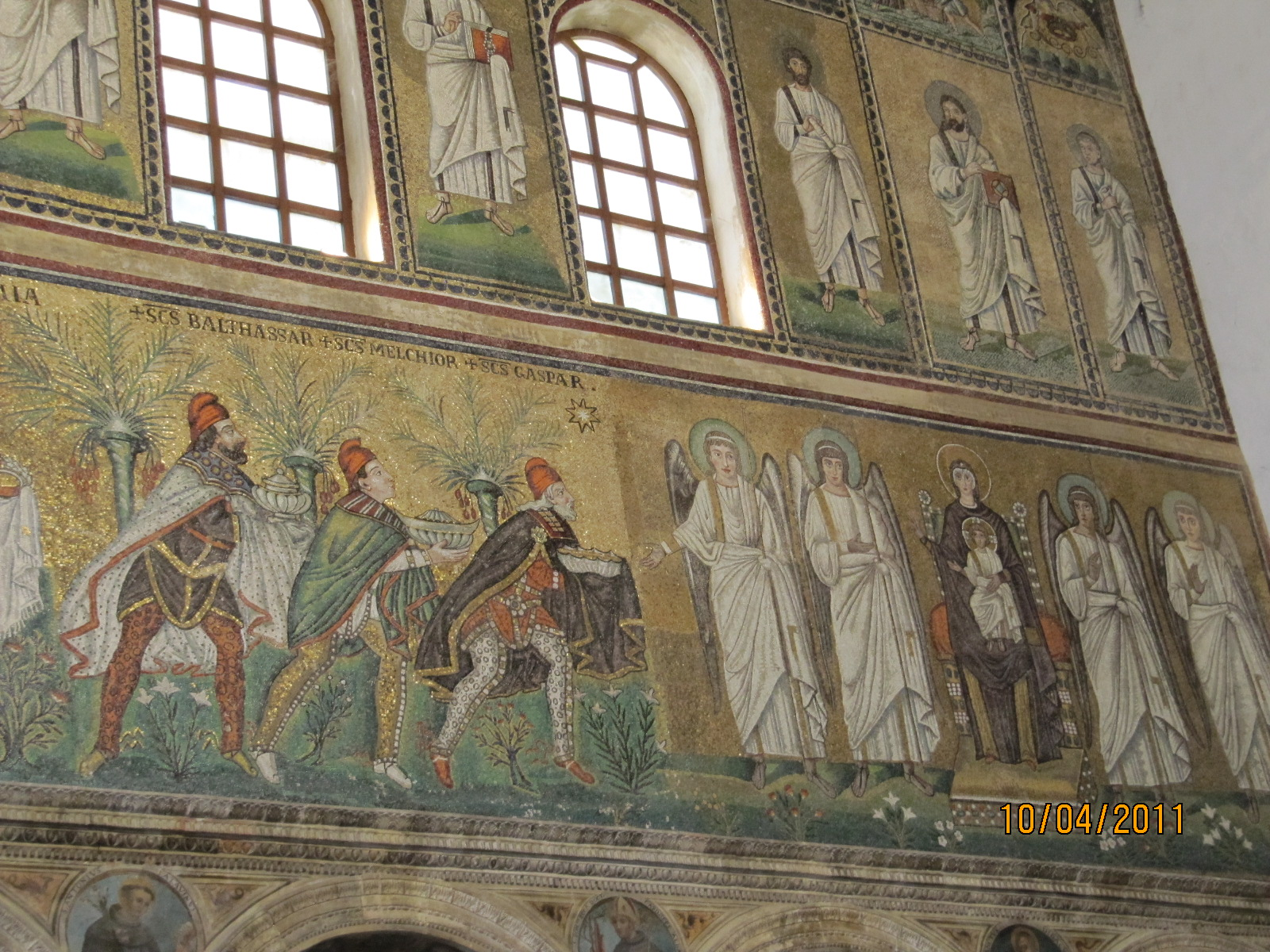 Basilica di Sant'Apollinare Nuovo This is a photo of a monument which is part of cultural heritage of Italy.